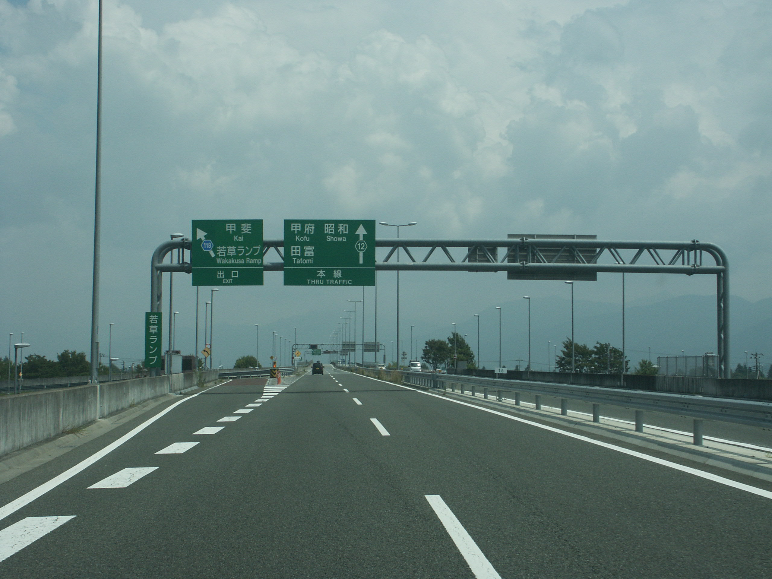 新山梨環状道路若草ランプ出口付近